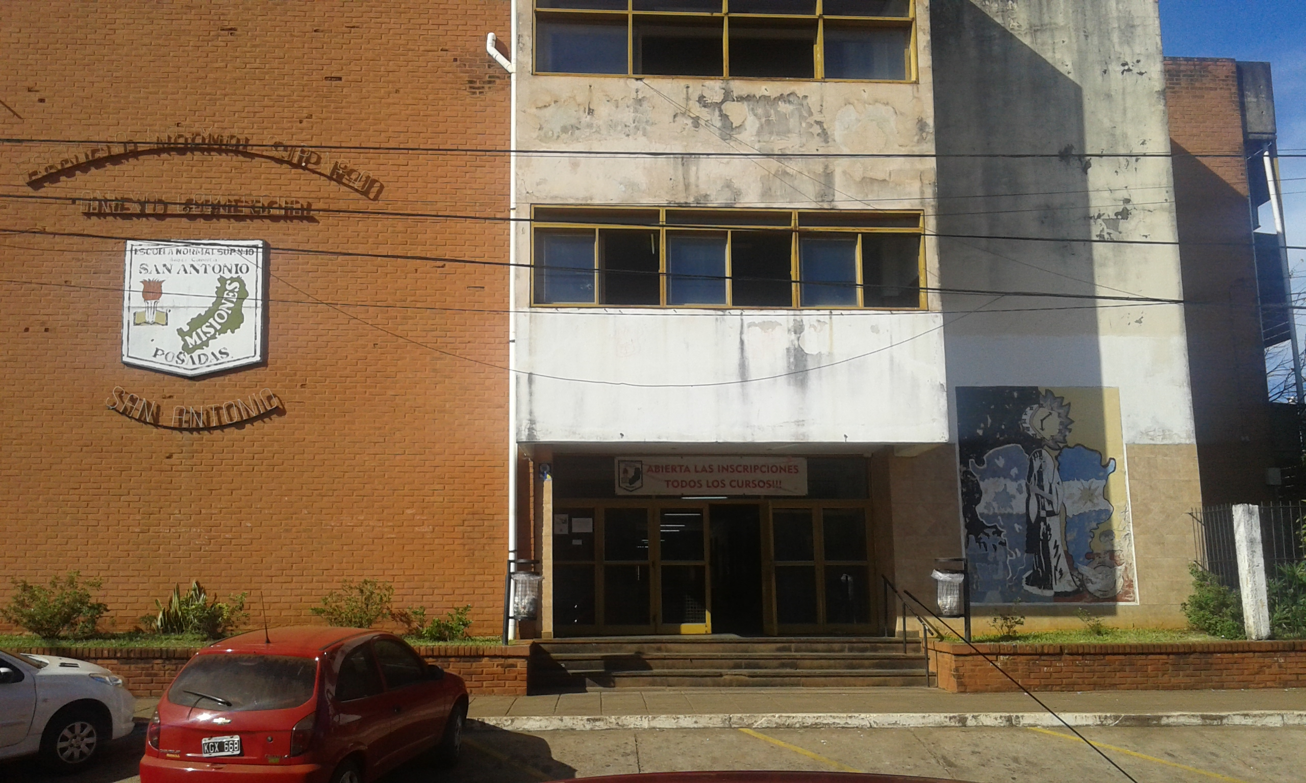 Es una escuela de nivel secundario y terciario del Barrio Rocamora de la ciudad de Posadas, provincia de Misiones